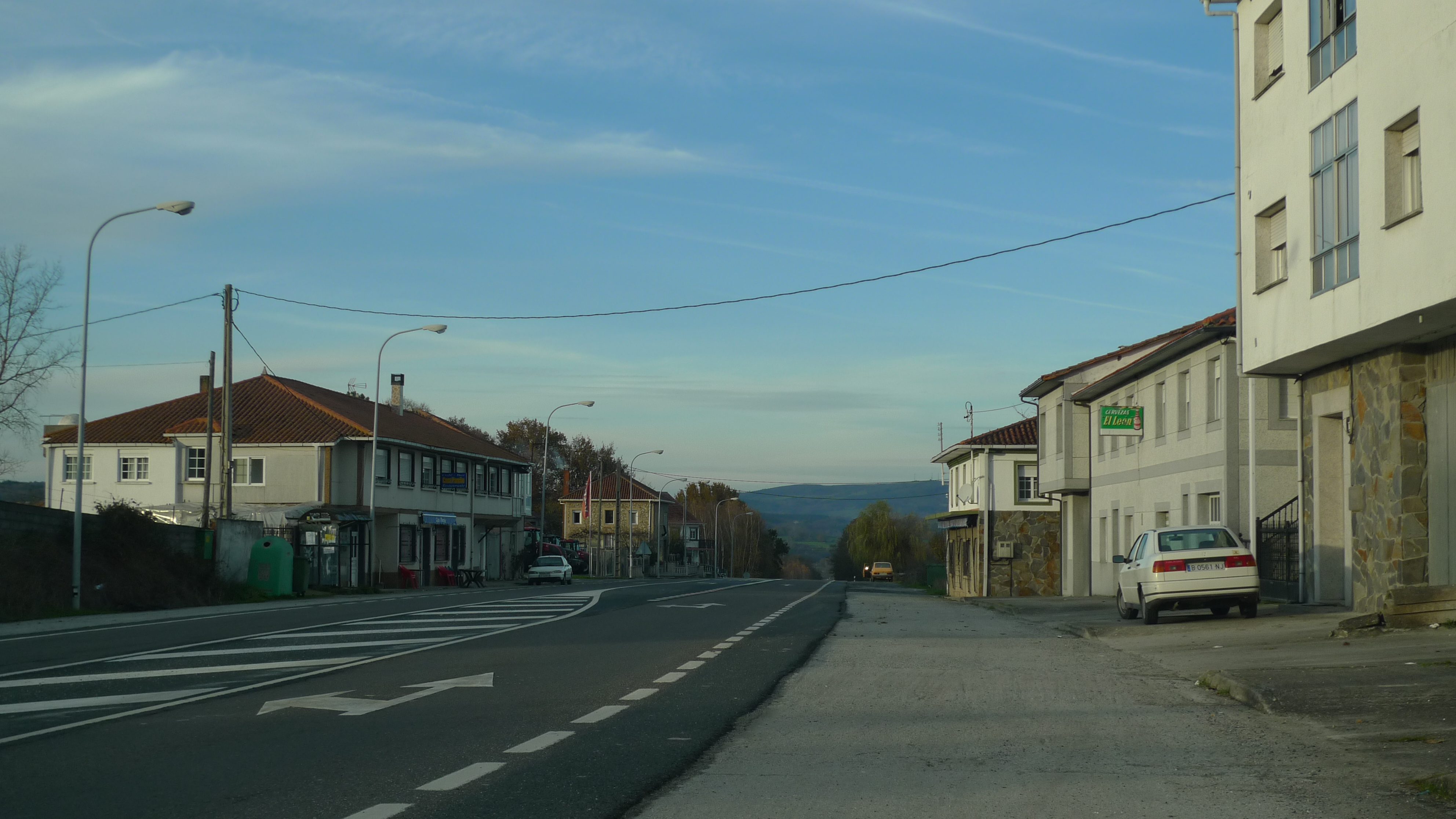 Alto de San Roque - Taboada (Lugo)